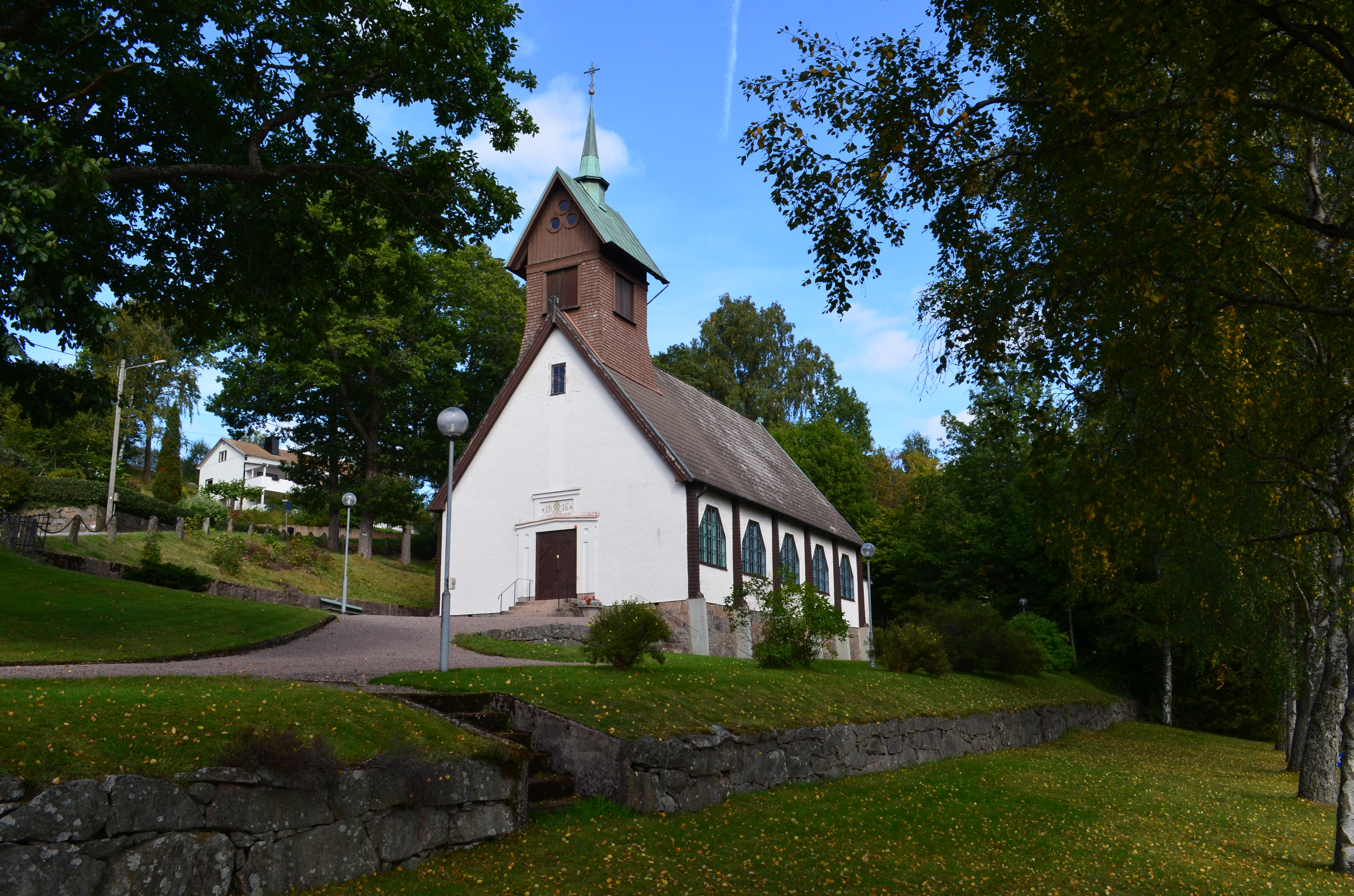 Olsfors kyrka från väster